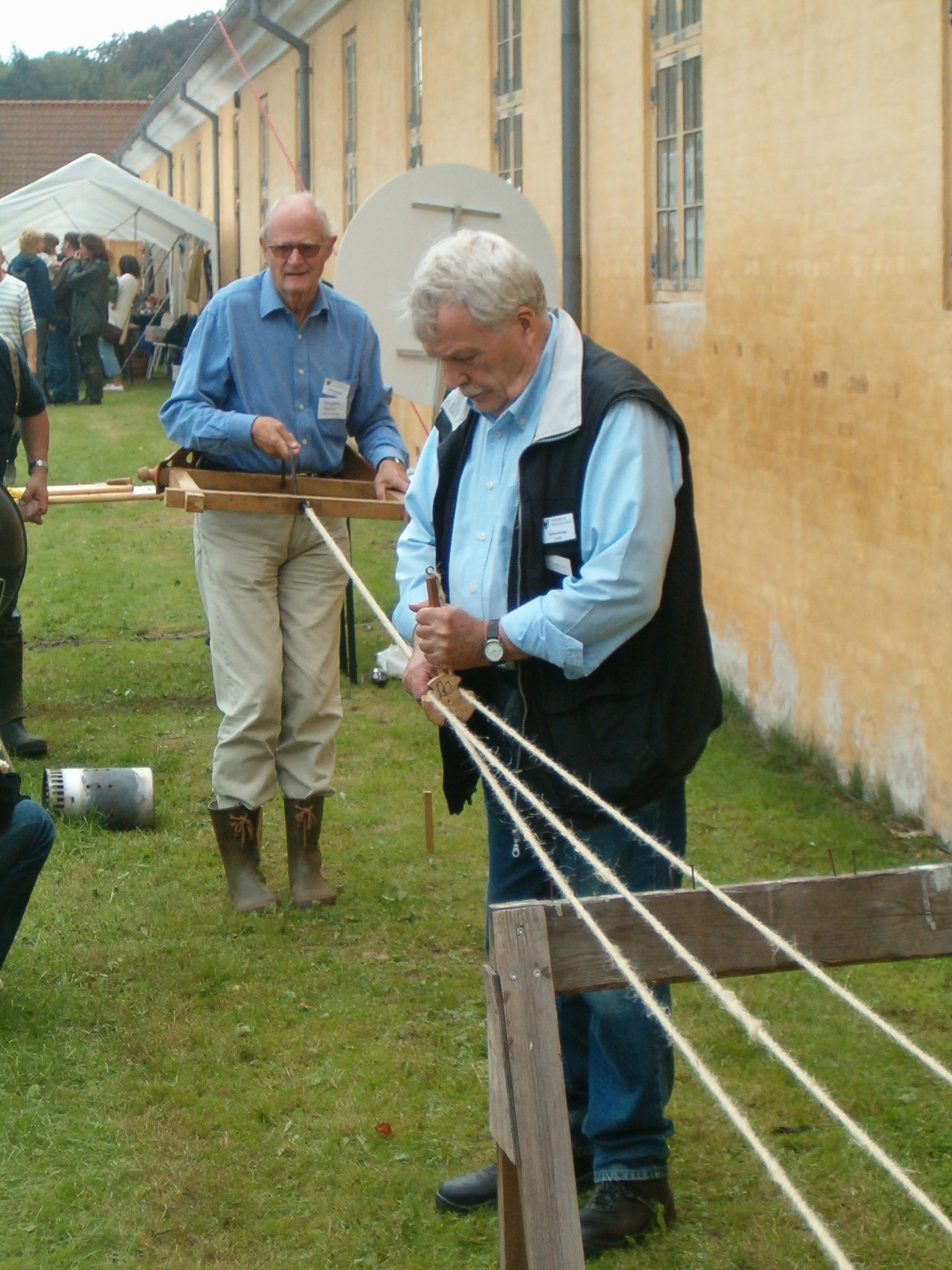 Dansk Sløjdlærerskoles reberbane fra den anden ende i brug på Skovbrugsmuseet i Hørsholm i 2006 med professor emeritus Mogens Nielsen fra Danmarks Lærerhøjskole for enden, assisteret af pensioneret overlærer Erik Houlberg Hansen, tidl. formand for Københavns Kommuneskolers Sløjdlærerforening og sløjdlærer på Gerbrandskolen på Amager.